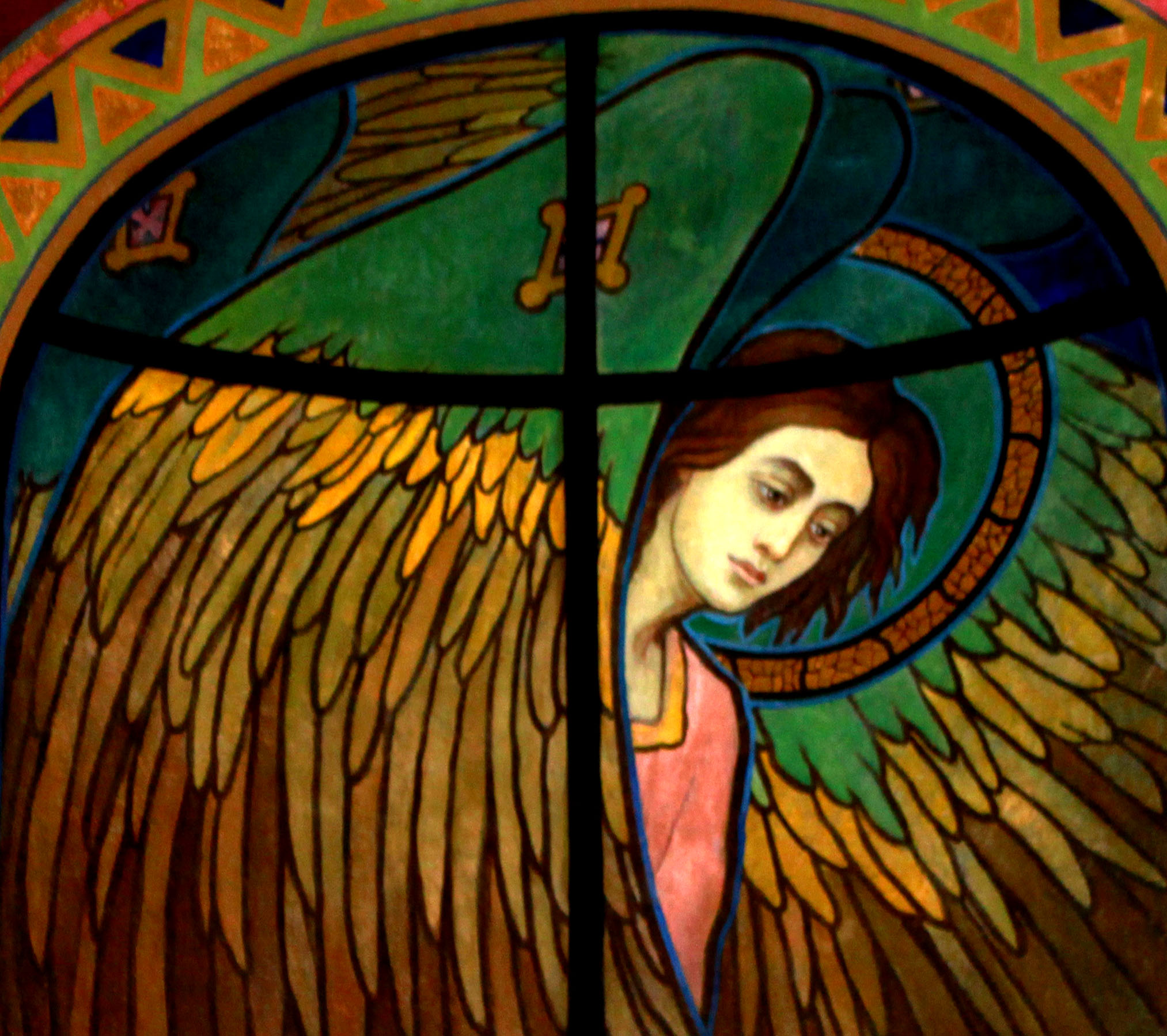 Фрагменти стінопису